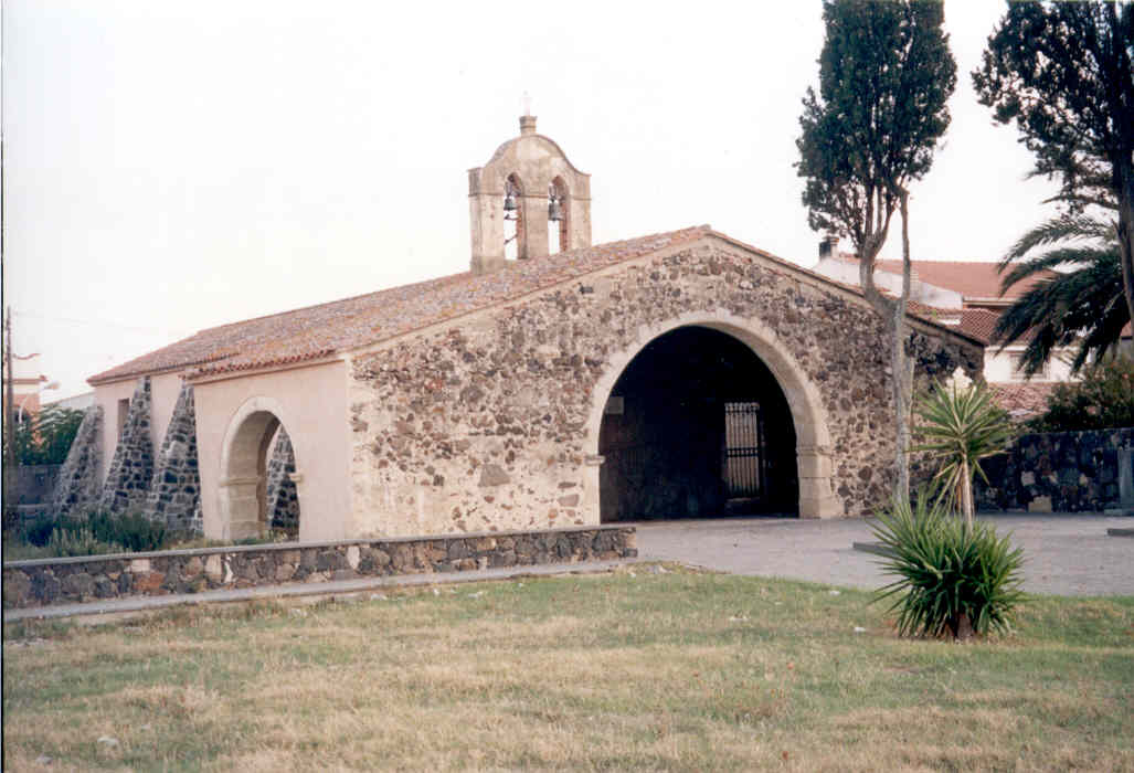 Chiesa di Sant'Antonio situata ad Uras